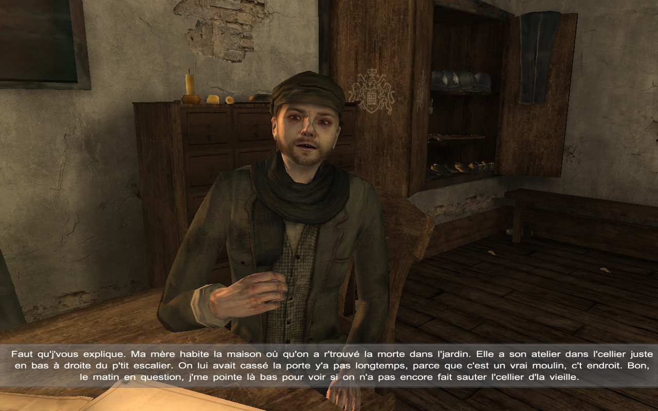 Capture d'écran du jeu Sherlock Holmes contre Jack l'Éventreur. On y voit Richardson exposant son témoignage au Docteur Watson dans le commissariat de Whitechapel.